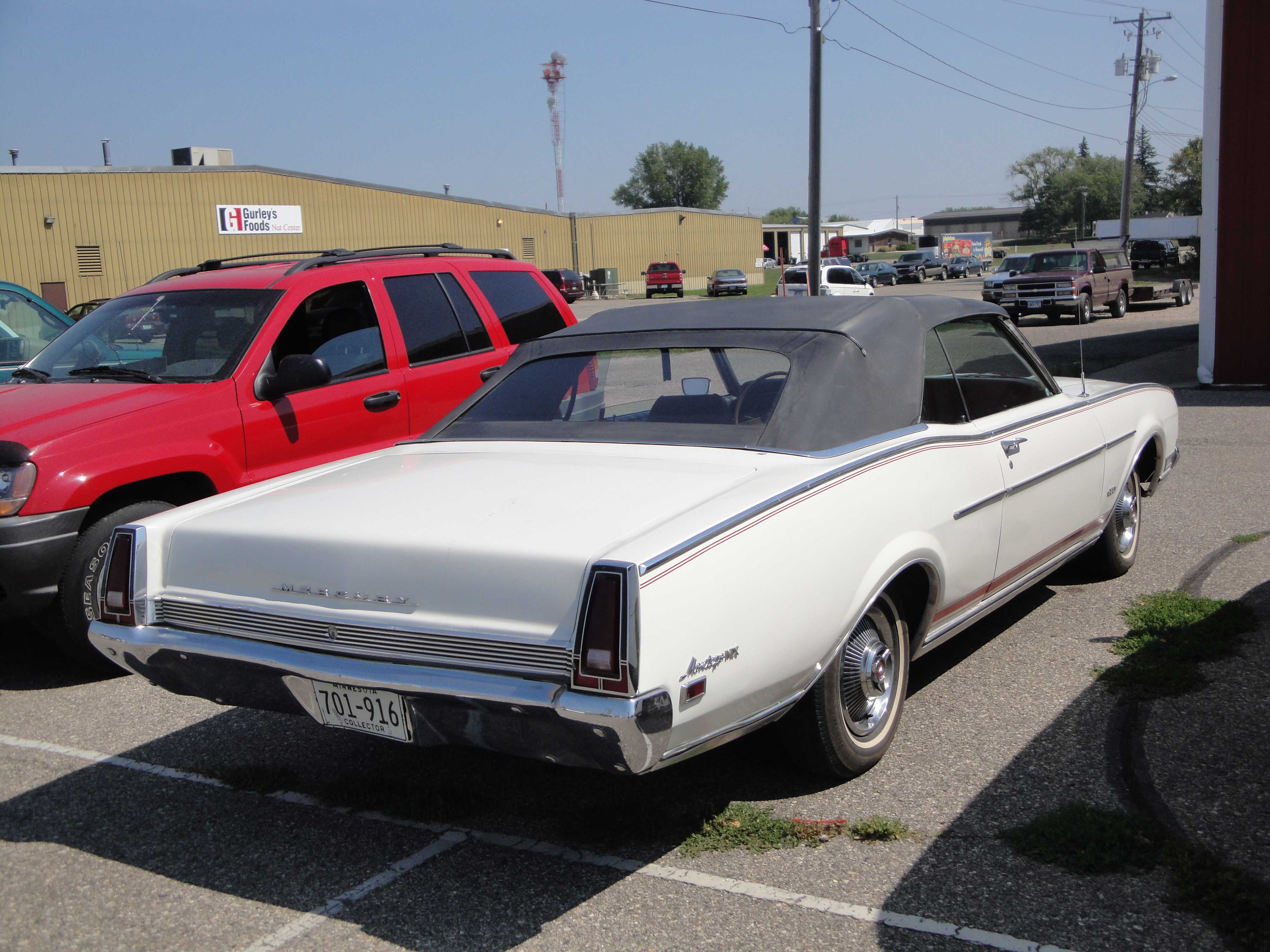 69 Mercury Montego MX